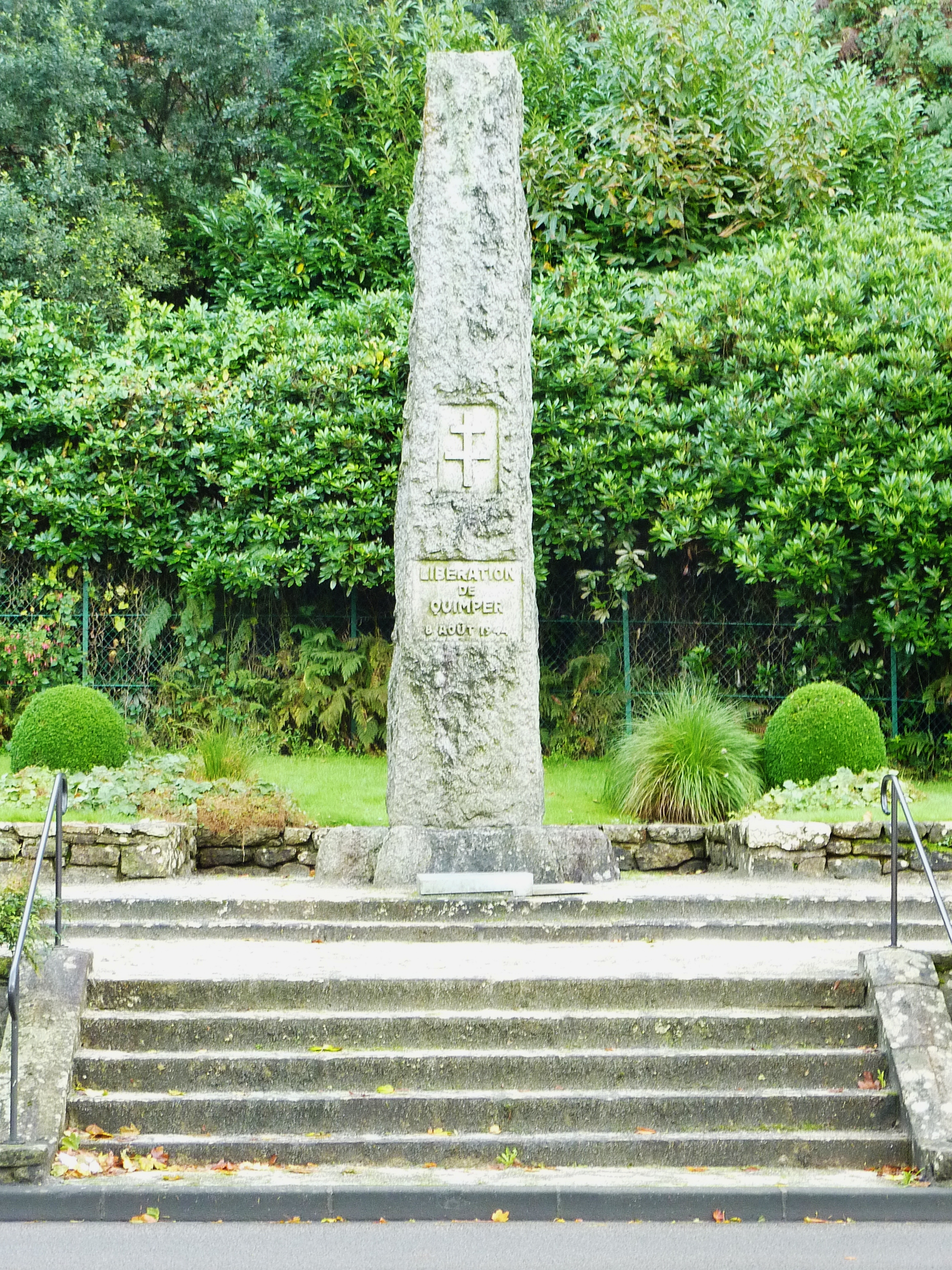 Quimper : le Monument de la Libération (rive gauche de l'Odet, au pied du mont Frugy)